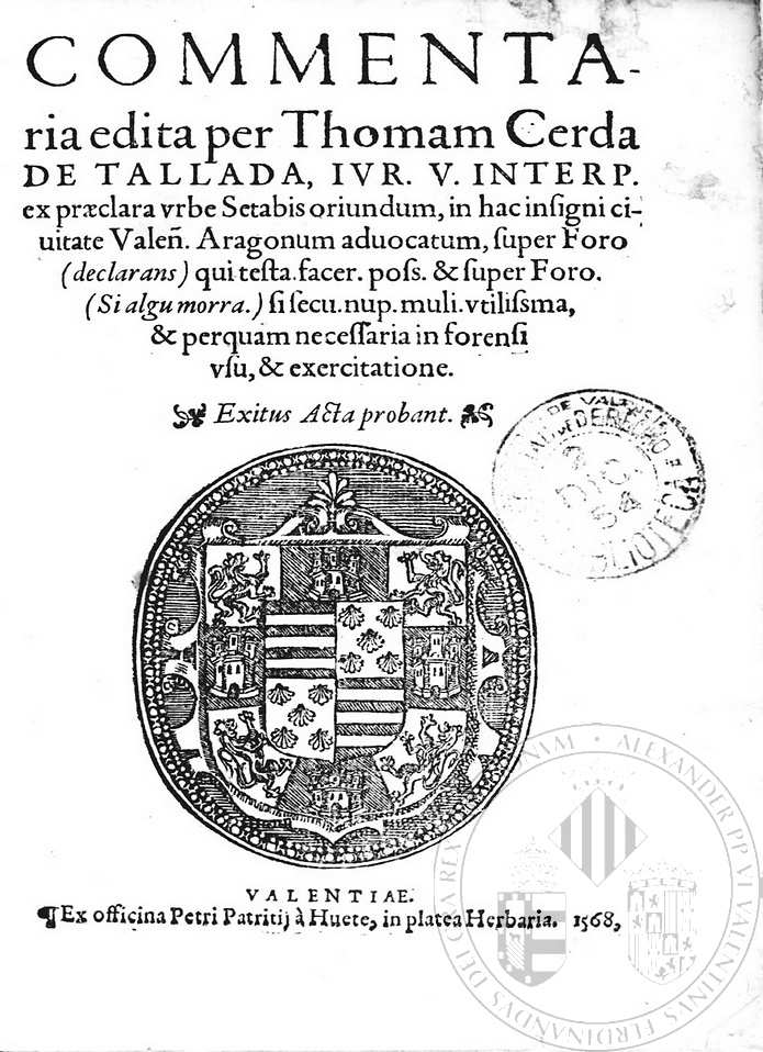 Portada de Commentaria edita per Thomam Cerda de Tallada ... super Foro (declarans) qui testa. facer. pos. & super Foro (Si algu morra.) si secu. nup. muli. vtilissima, & perquam necessaria in forensi vsu, & exercitatione ...